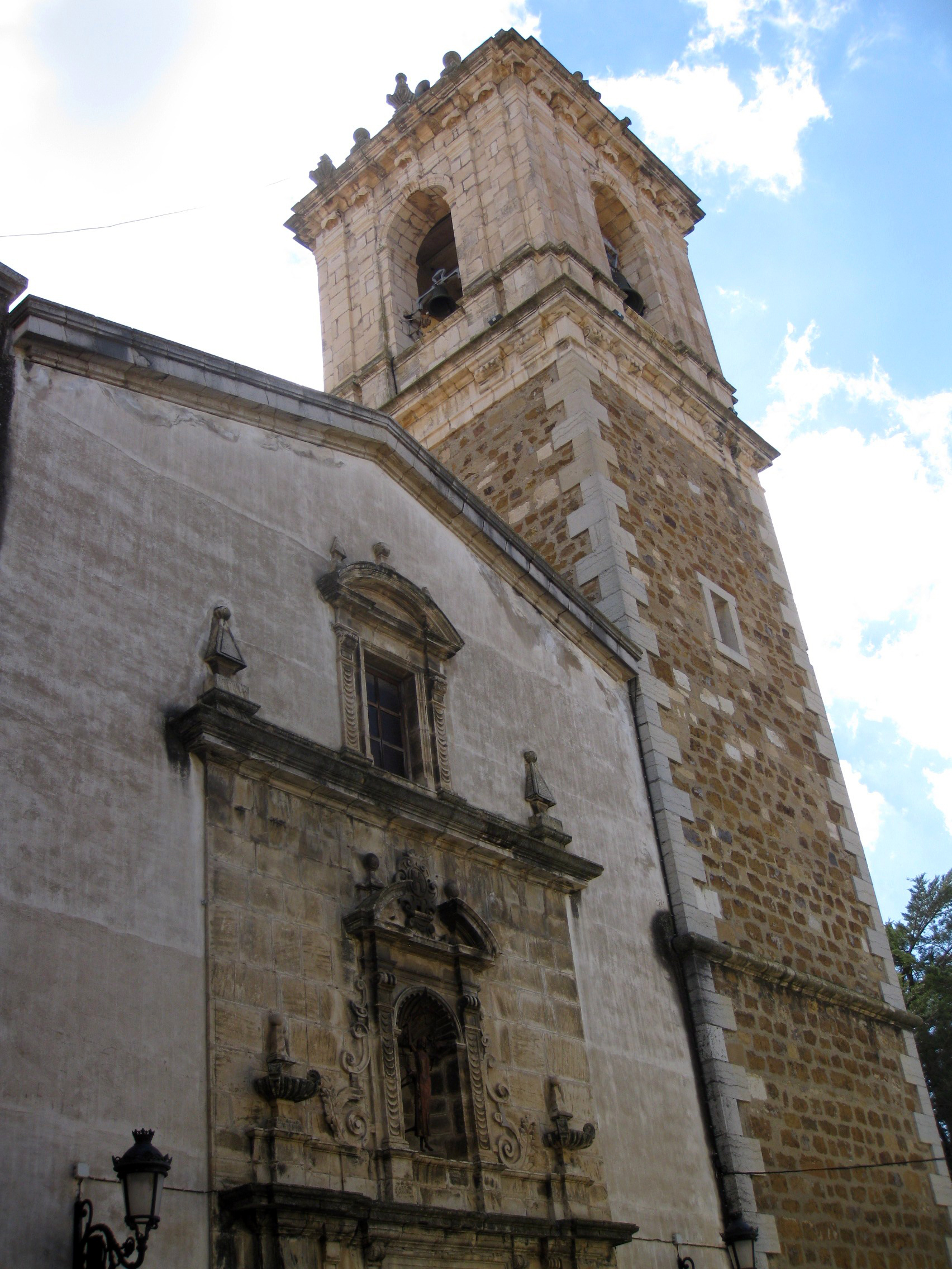 Església parroquial de l'Assumpció (Benassal) 02.026-008.